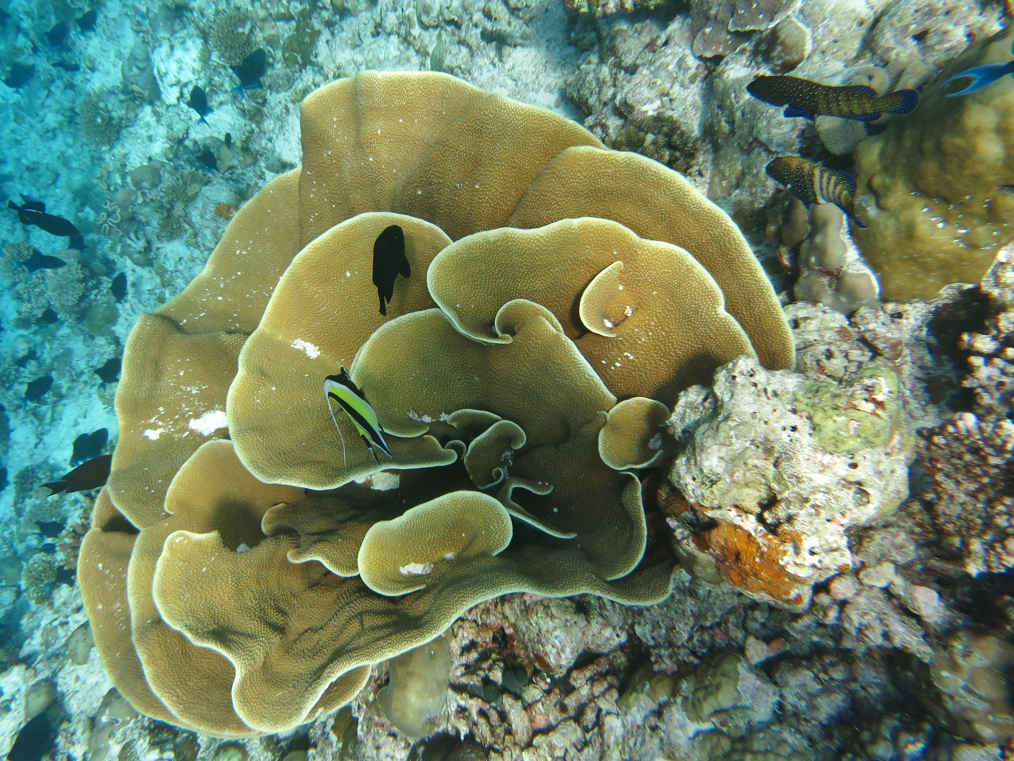 Une colonie de corail Turbinaria mesenterina aux Maldives (atoll de Baa).